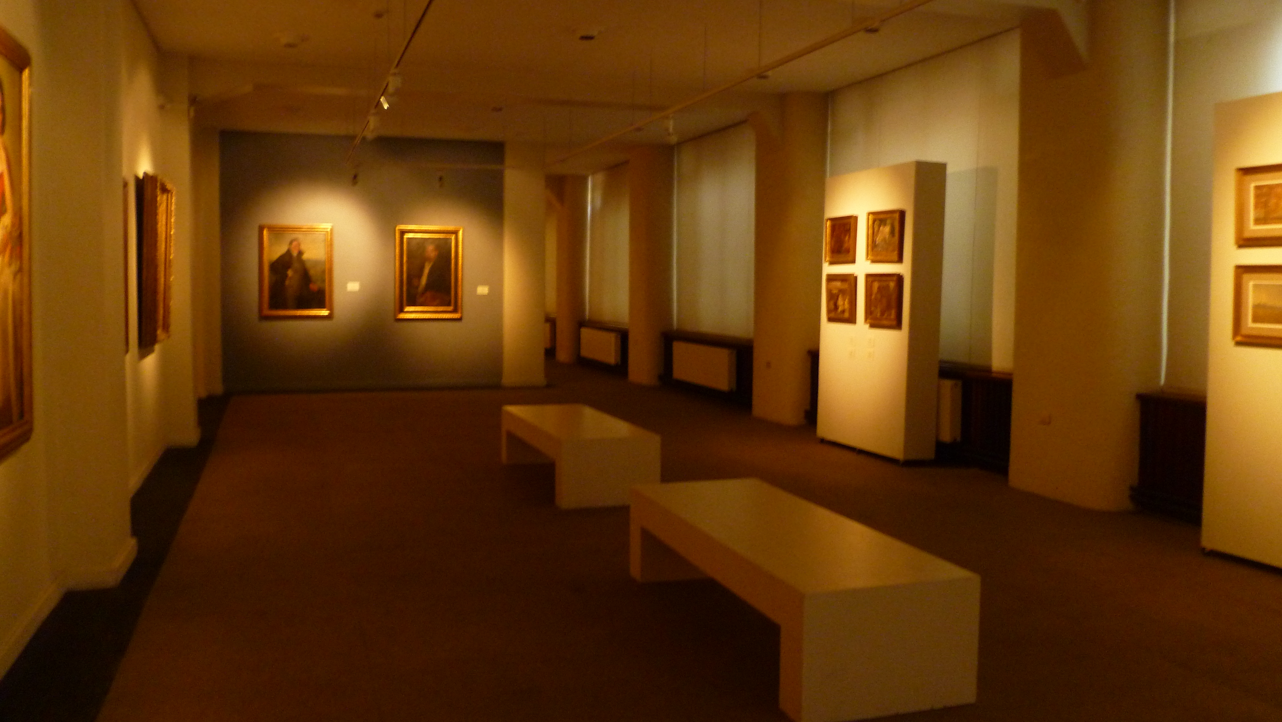 Reconocimiento — Casa del arte.